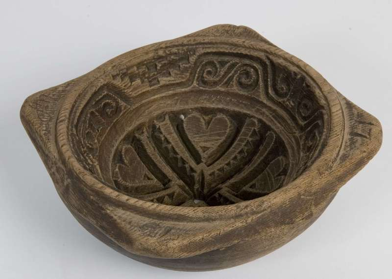 Bolleformet smørform i tre fra Hallingdal. Formen er dreid med skåret dekor og datert 1713. Foto: Anne-Lise Reinsfelt / Norsk Folkemuseum, NF.1898-0686.